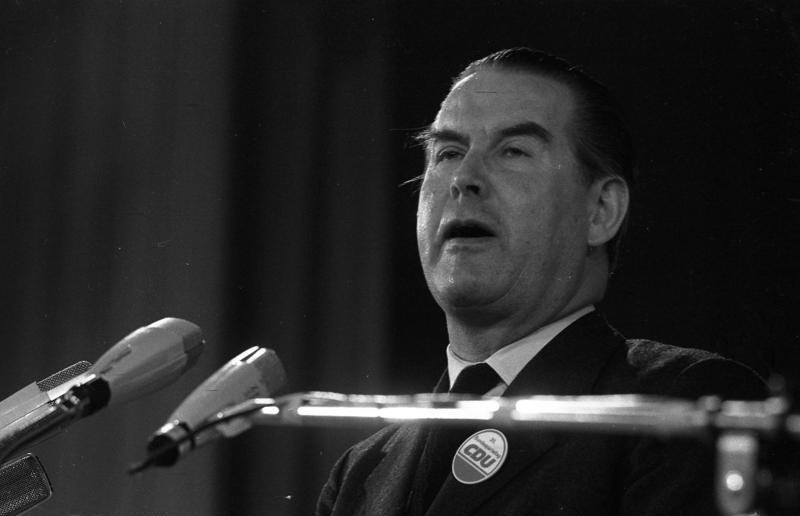 CDU-Parteitag 1972 in der Wiesbadener Rhein-Main-Halle (Gerhard Schröder) 9.-11.10.1972